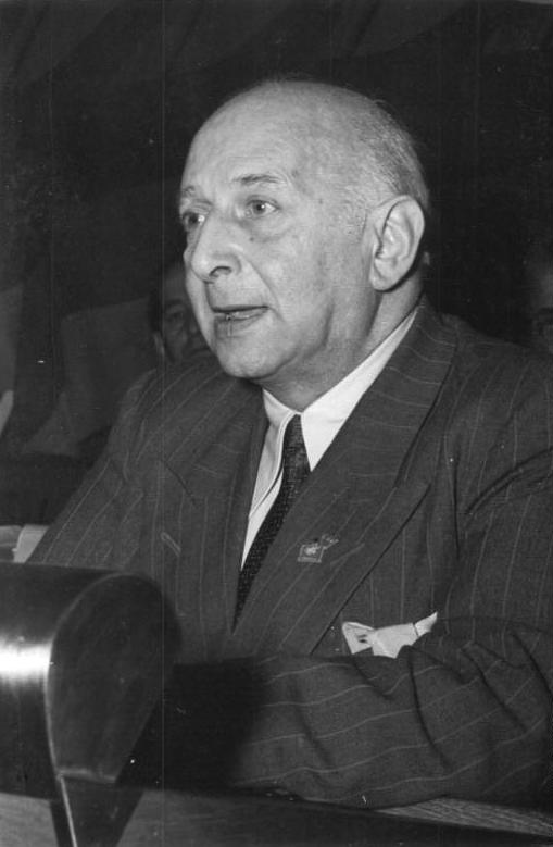 Illus-Quasch. 20.11.51 1.Tagung der deutschen Verleger am 19. und 20.11.51 in Berlin. UBz: Der Dichter Rudolf Leonhardt bei seiner Diskussionsrede.